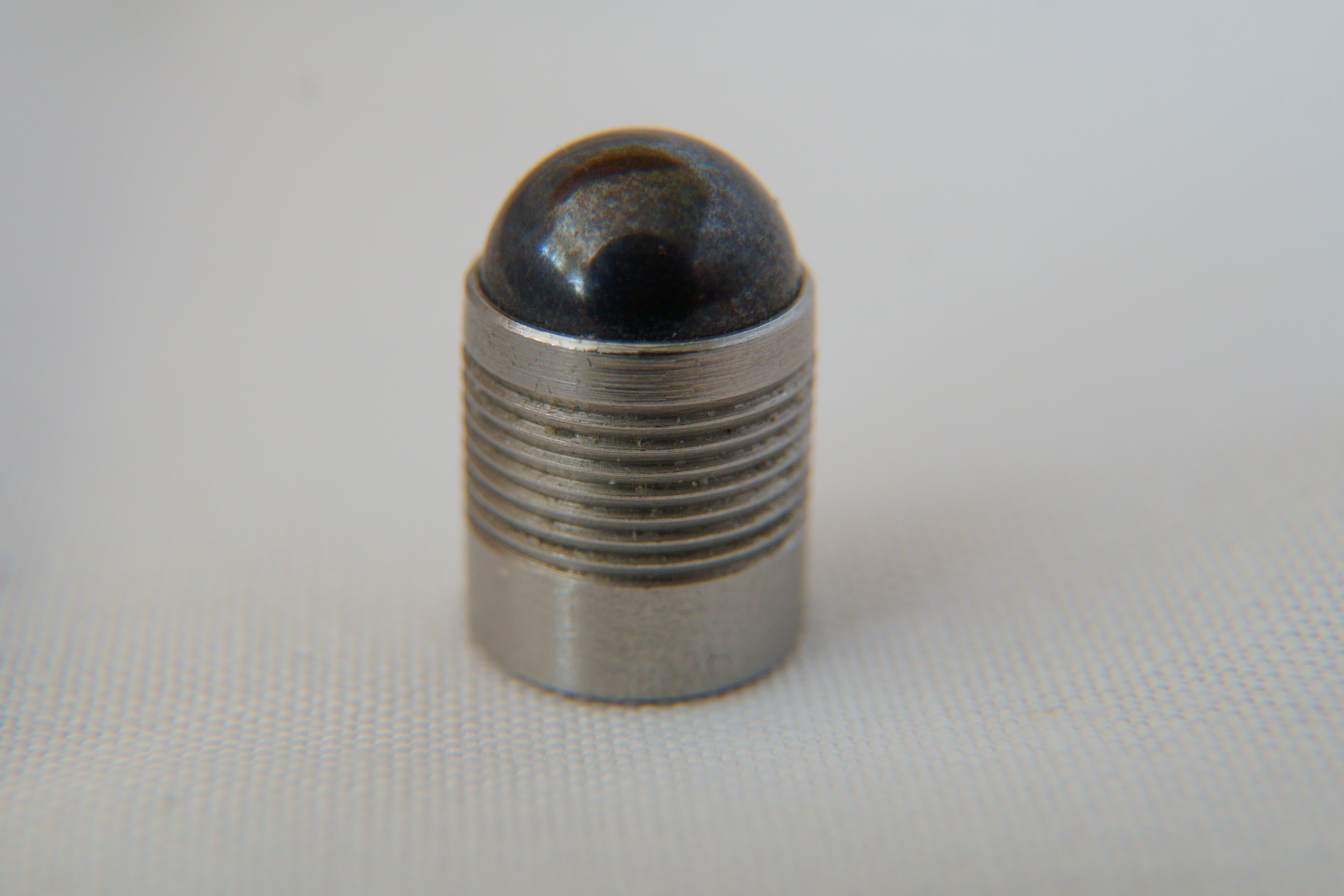 Koenig-Expander, Durchmesser 10 mm, ein Dichtstopfen. Der untere Teil hat eine Becherform, der obere Teil besteht aus einer gehärteten Stahlkugel. Dieses Bauteil wird benutzt um Bohrlöcher abzudichten. Das Bauteil wird mit dem flachen Ende zuerst in die Bohrung eingeführt und die Kugel mit einem Werkzeug eingepresst. Das Bauteil erweitert den Durchmesser, die Riffelung verzahnt sich mit der Bohrungswand und ein Formschluss wird erreicht. Die Abdichtung kann gemäß den Spezifikationen abhängig von Material und Durchmesser einem hydraulischem Druck von mehreren hundert bar standhalten. Vorteil ist die schnelle und sichere Anwendung, es wird kein Gewinde benötigt. Der Expander kann nachträglich nicht mehr entfernt werden. Die Aufnahme wurde mit einem 21 mm Zwischenring gemacht.